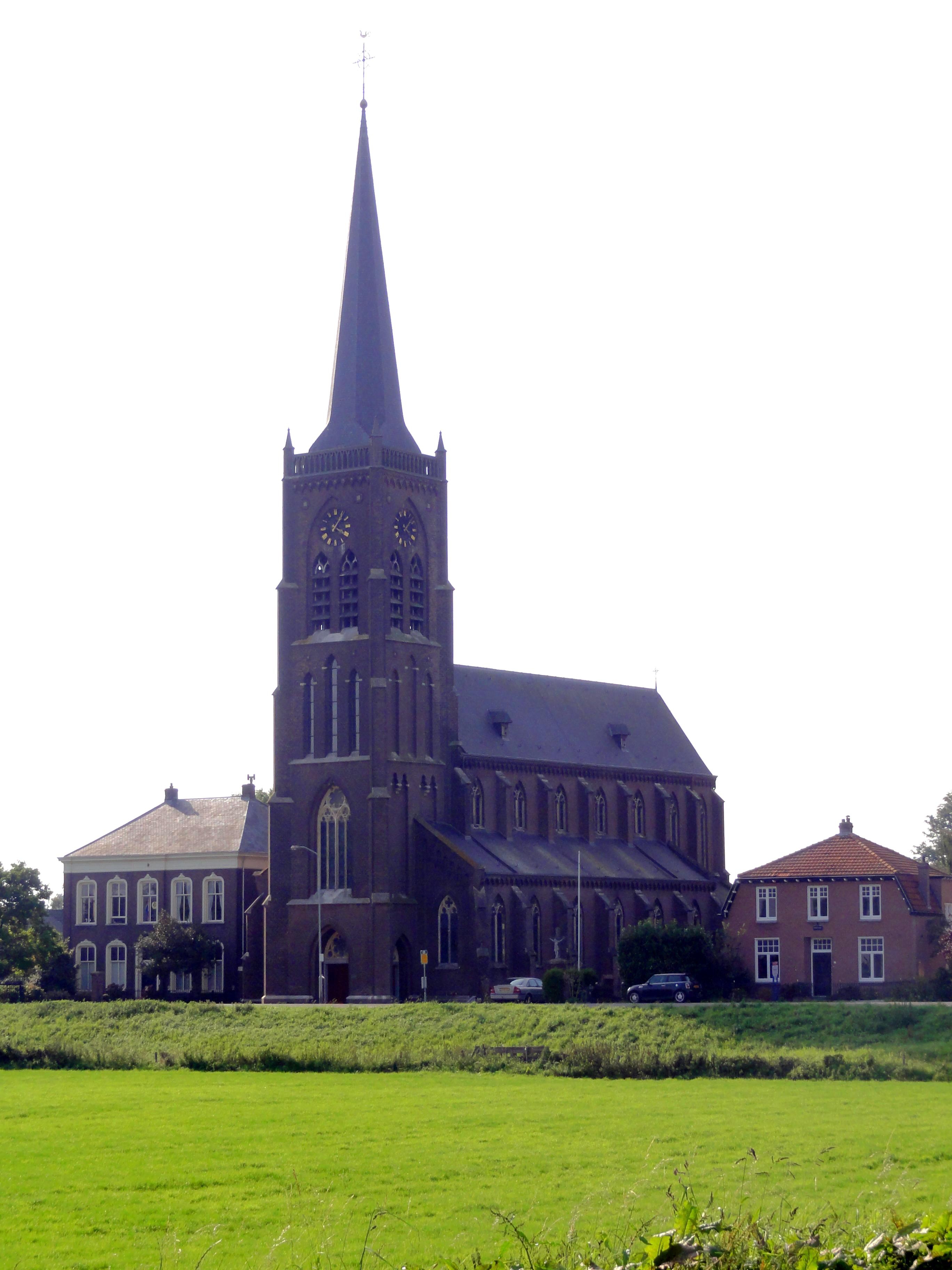 Batenburg Rijksmonument 8718 kerk St.Victor Molendijk 3 4″ N, 5° 37′ 51.38″ E